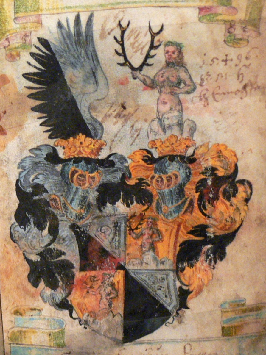 Wappen des Georg Ehrenreich Perger von Clam (Grafik: Linz 1582), geviert von † v.Noppingen und Perger